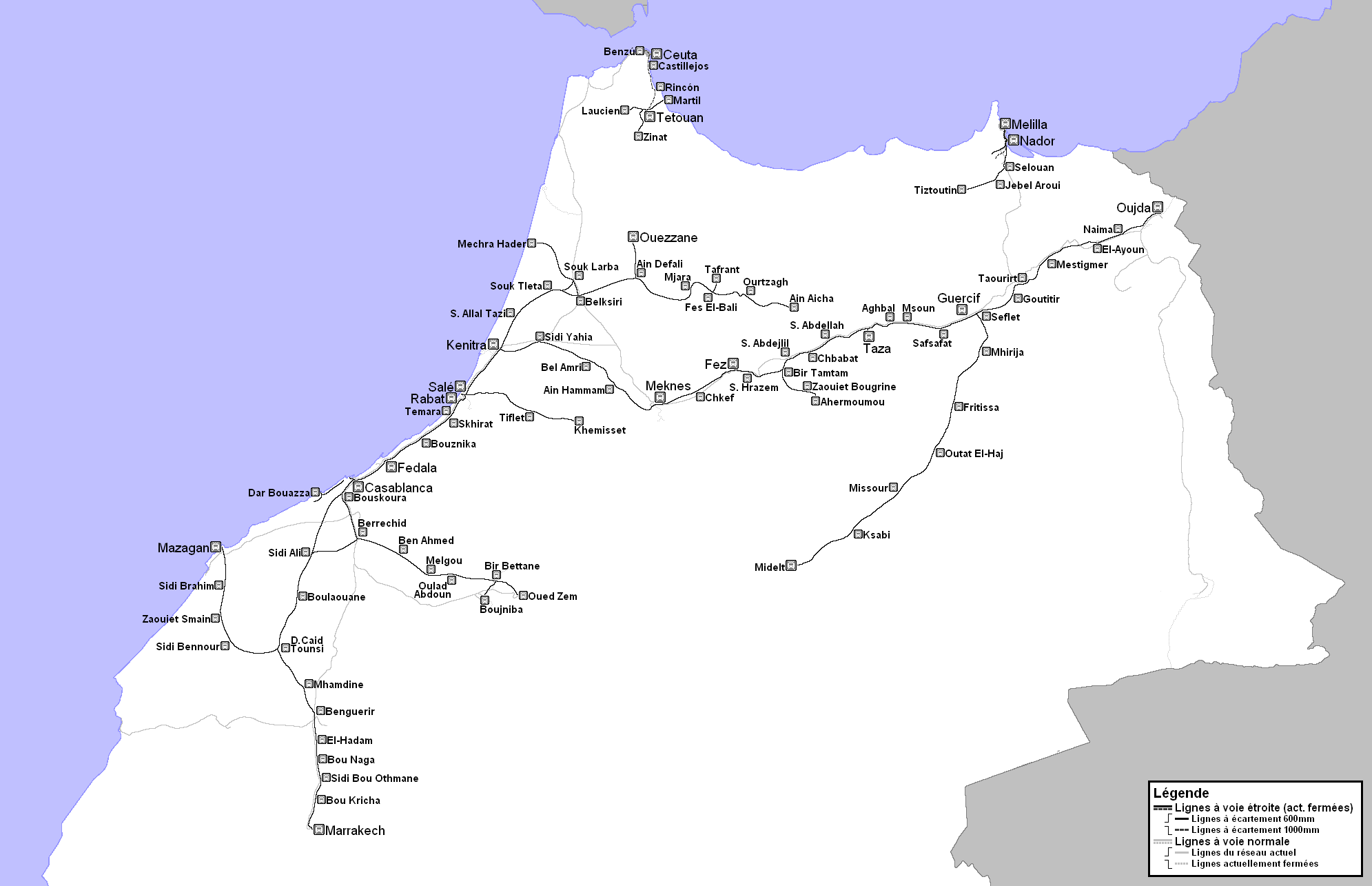 Carte du réseau ferroviaire à voie étroite au Maroc (dernières lignes fermées dans les années 1950's)